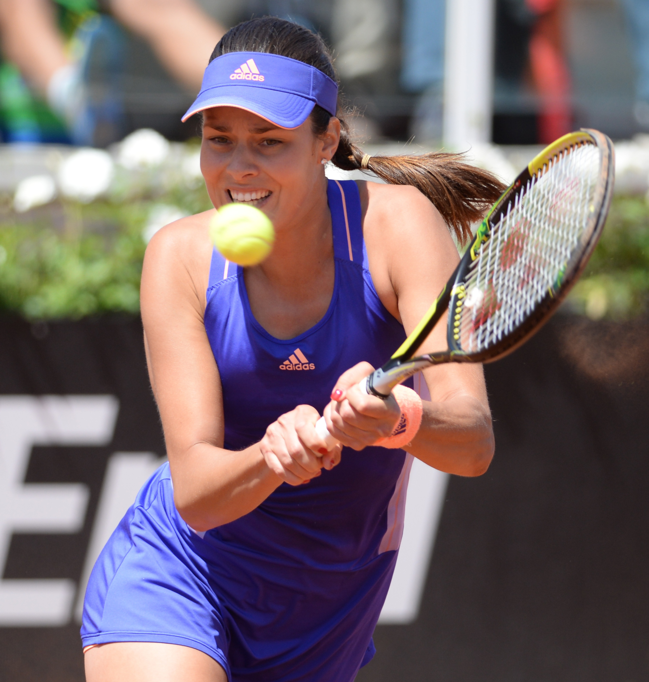 Ana Ivanovic